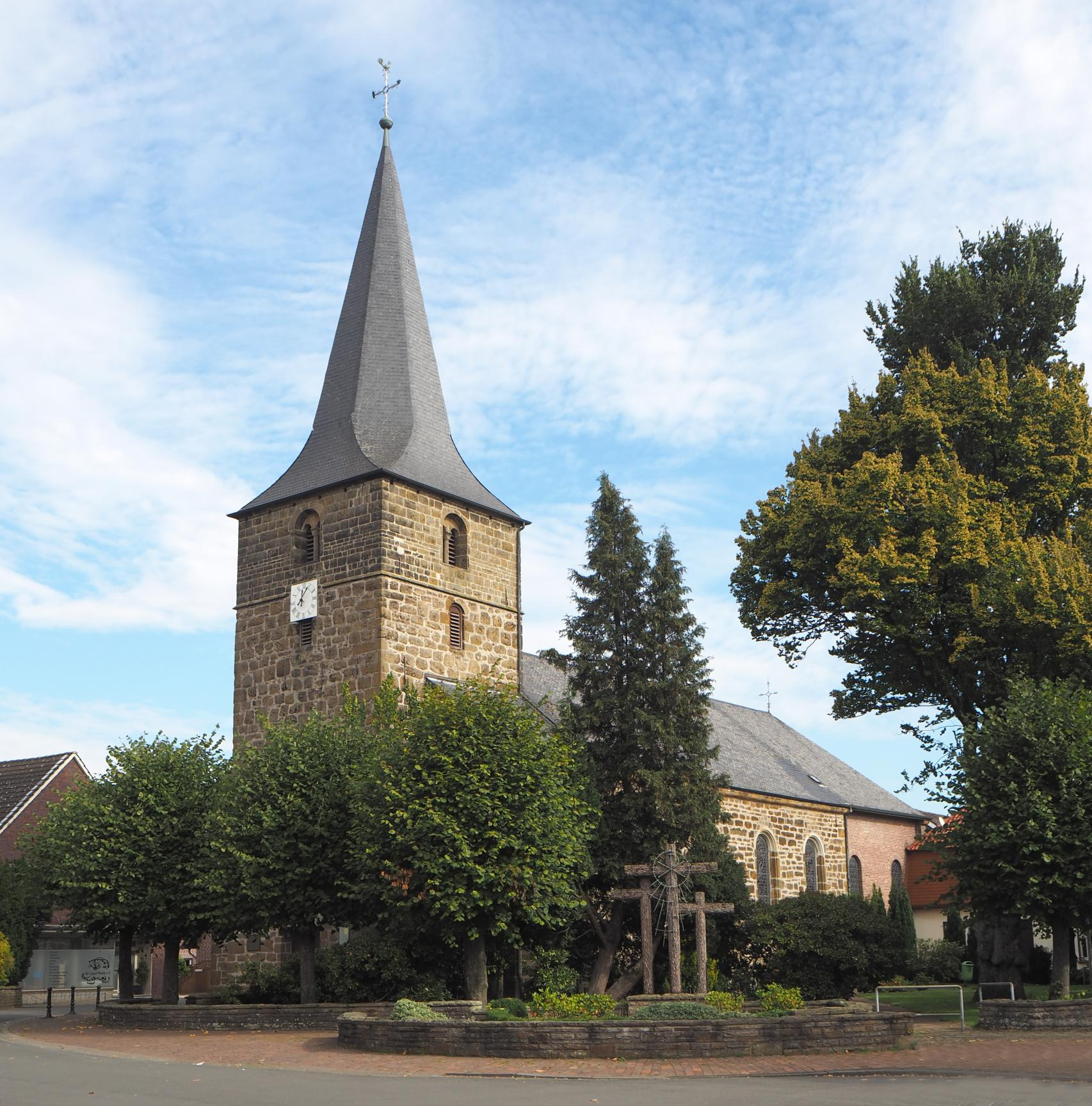 Rhade (Dorsten), NRW, Kirche St. Urbanus, Foto: Oktober 2015